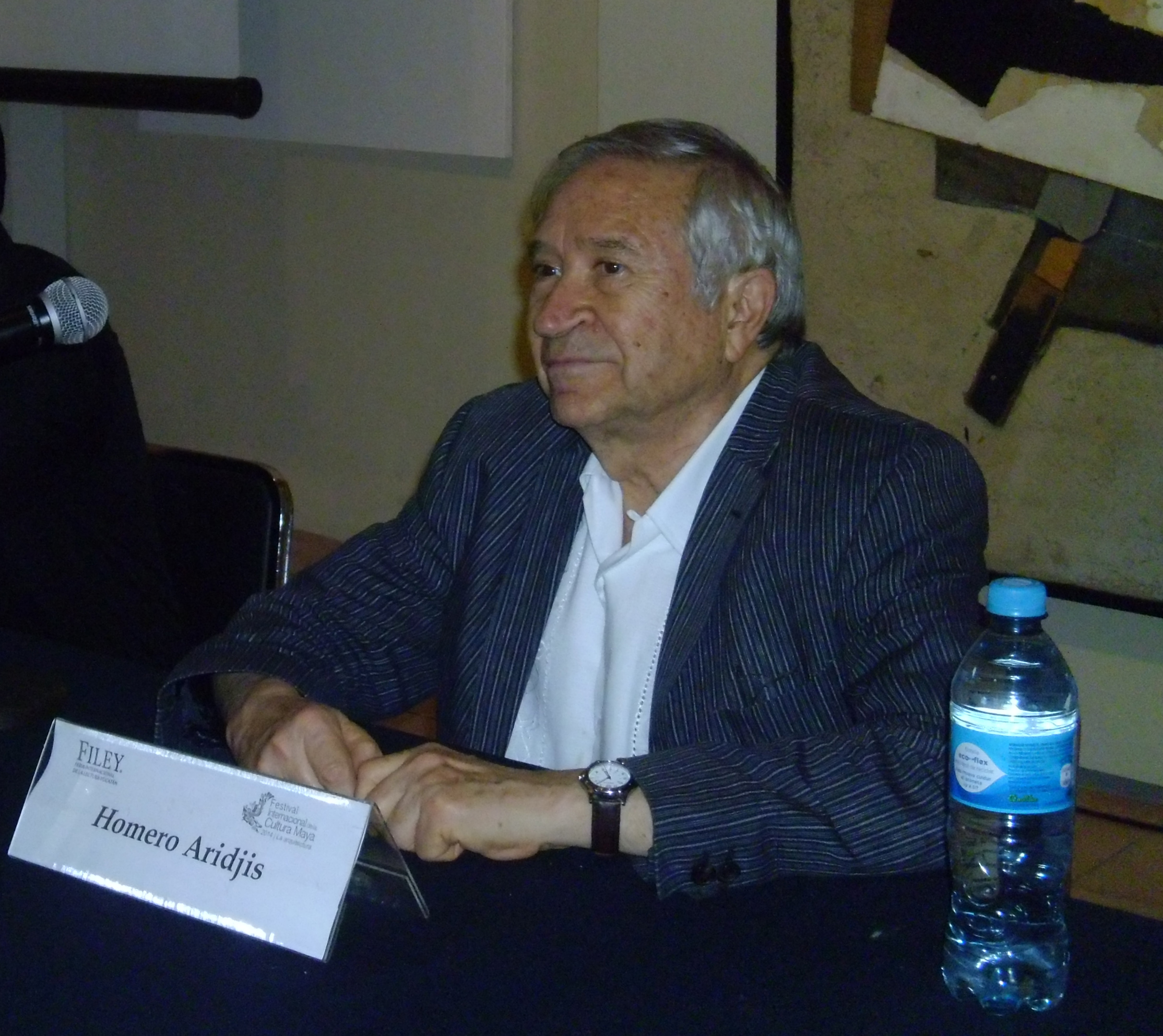 El escritor Homero Aridjis durante la presentación de su libro "Ciudad de zombis" el 26 de octubre de 2014 en el Museo Macay de la ciudad de Mérida, Yucatán, México.